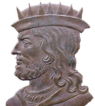 Childéric roy de France par Jean Dassier (1676-1763) :+01+ (ca 436-481). Buste du roi à gauche ceint d'une couronne barbare. Médaille de bronze, 31 mm, 15,37 g.